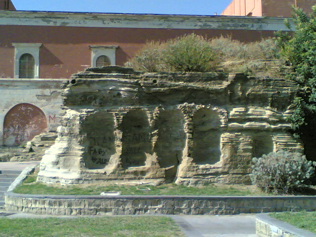 Resti archeologici della Villa di Licinio Lucullo